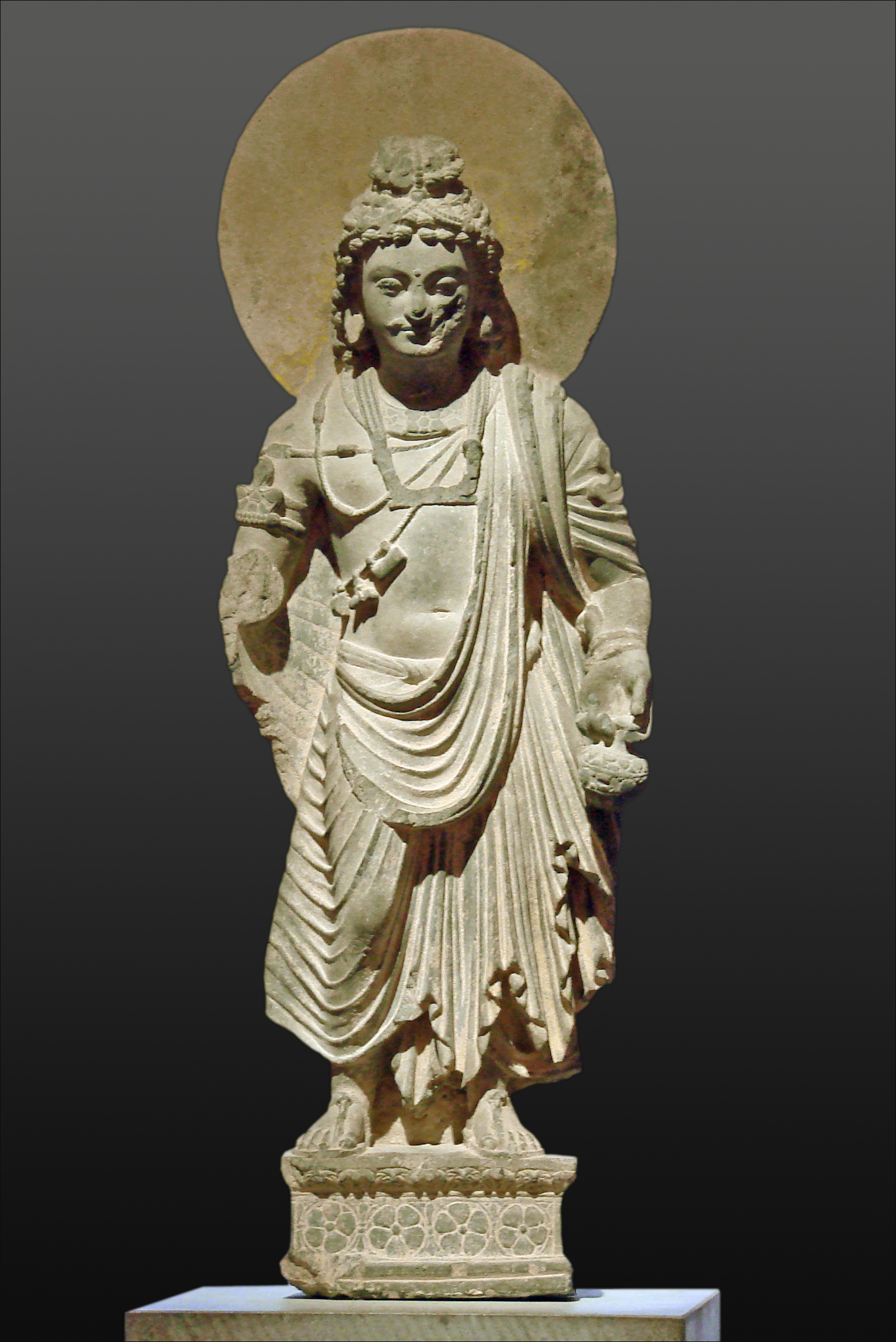 Bodhisattva Maitreya debout. Pakistan. Shahbaz - Garhi. Art du Gandhara, Ier-IIIème siècle. Schiste gris. Musée Guimet